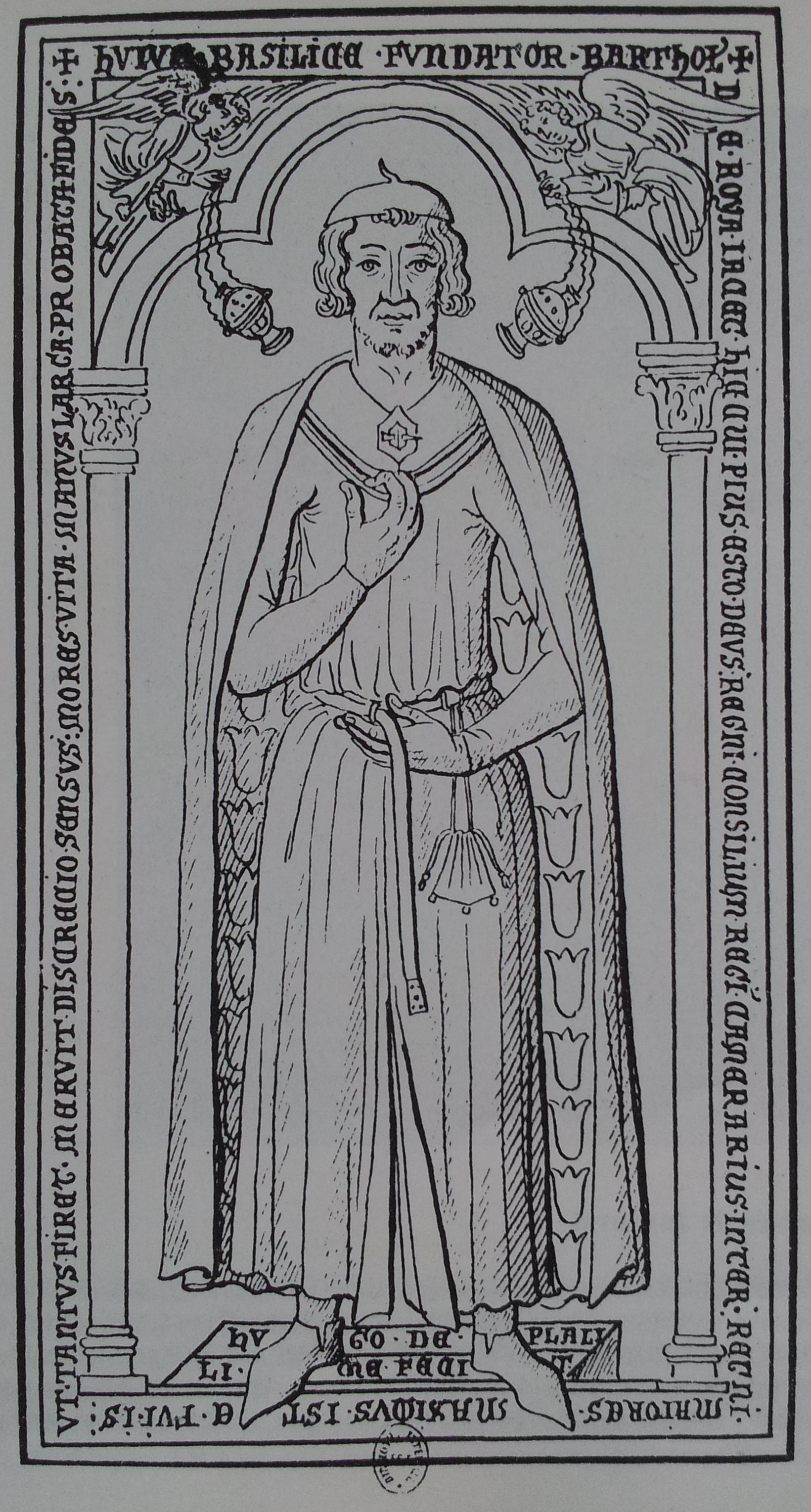 Gisant, à l'origine en cuivre, Barthelémy de Roye dans l'Abbaye de Joyenval. Disparu depuis.